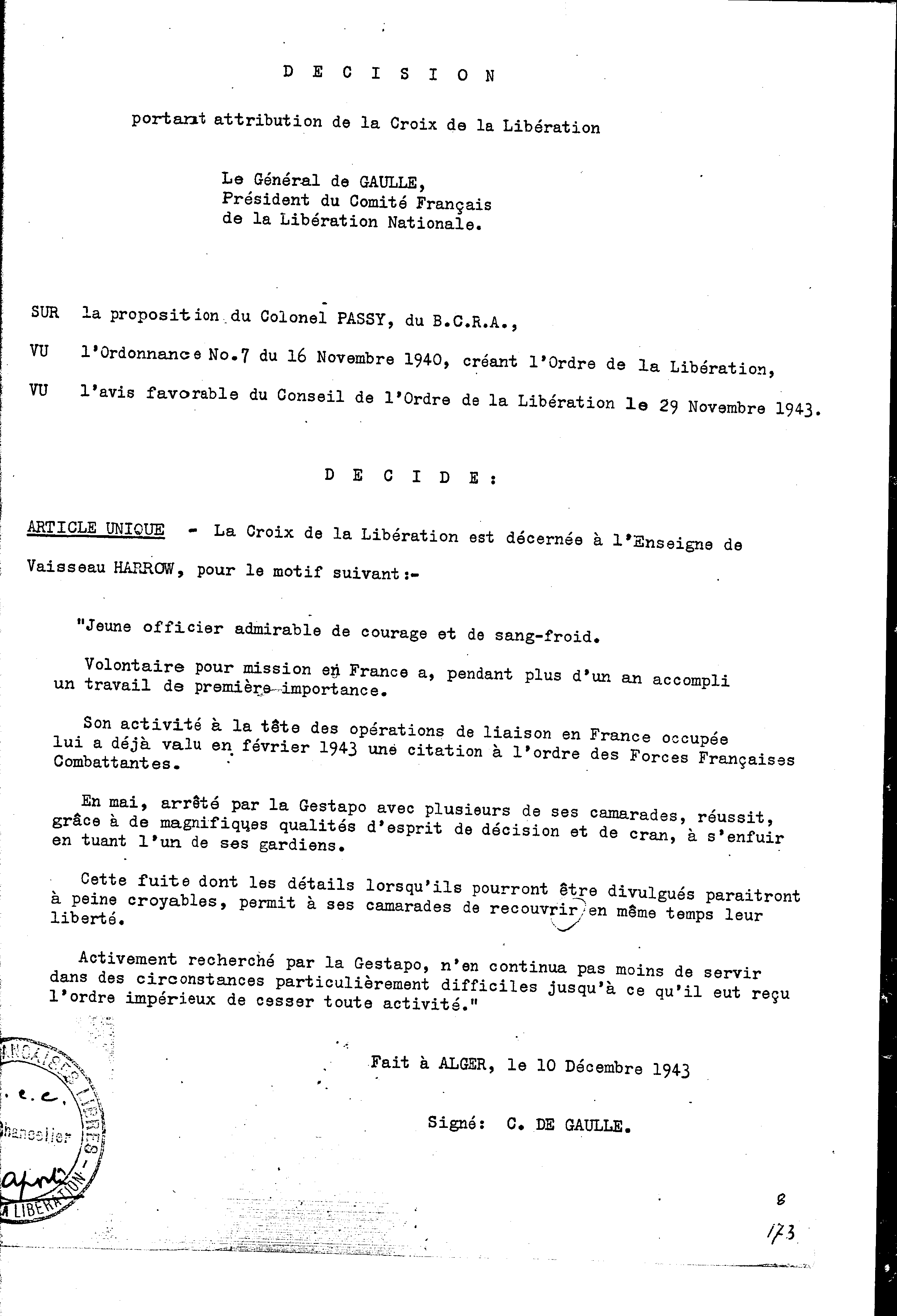 10.12.1943 Jean Ayral est décreté chevallier de la Légion d'Honneur